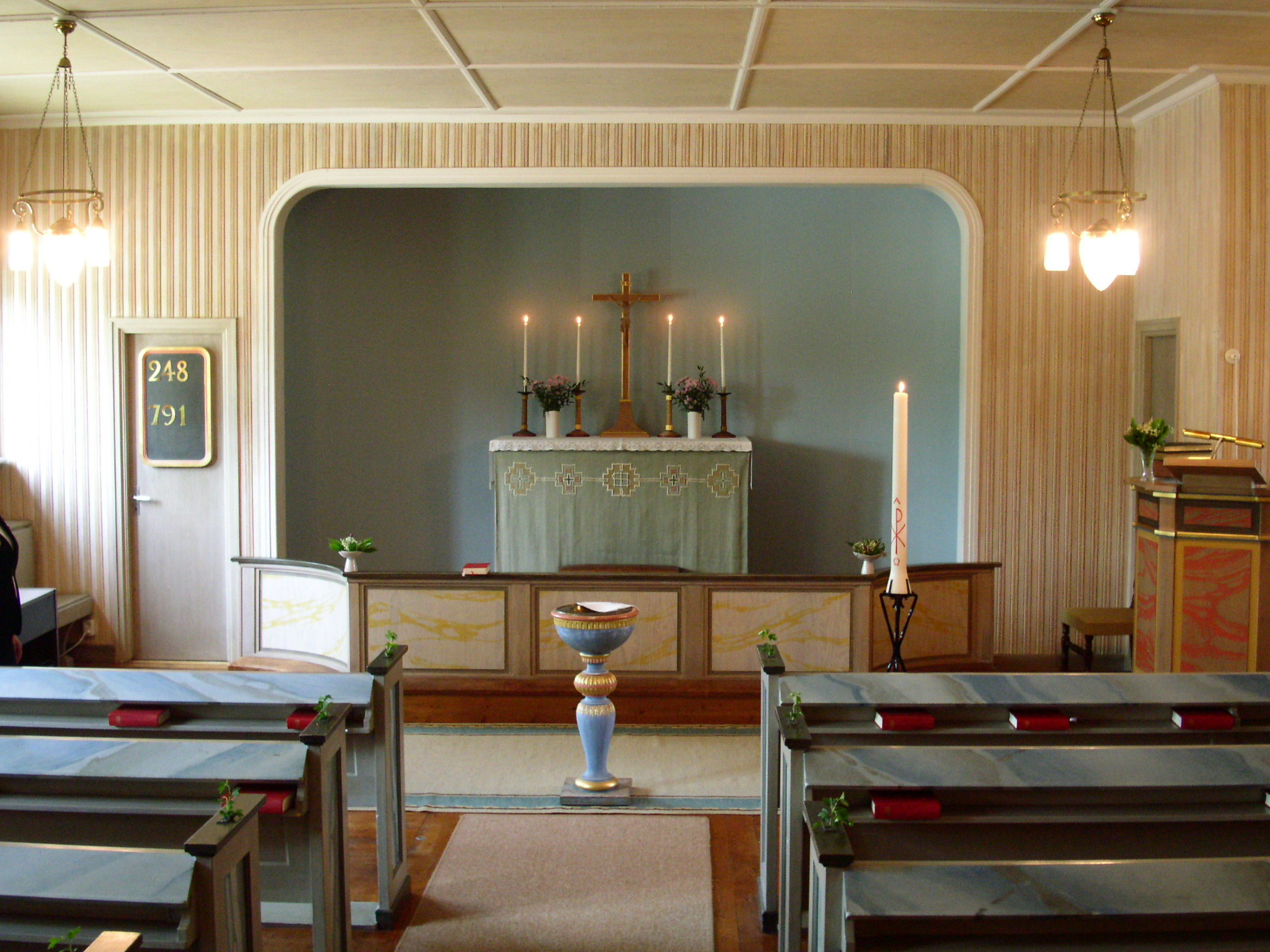 Saxdalens kapell, Grangärde församling.